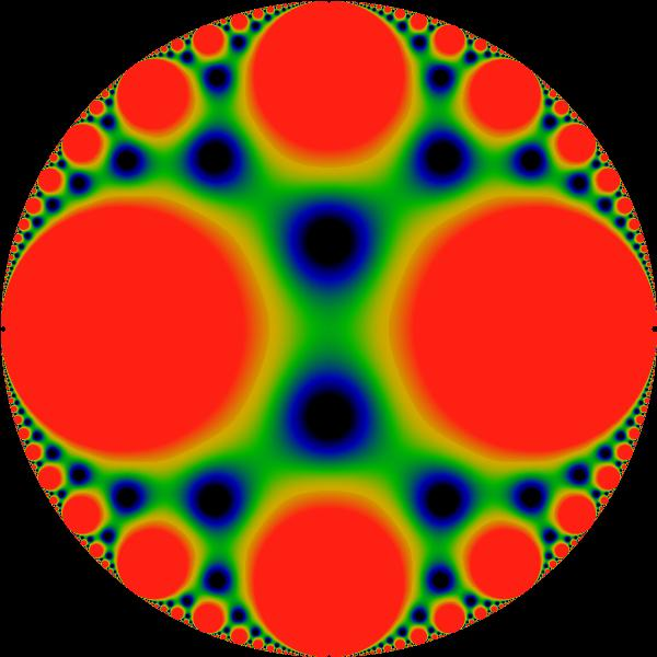 Klein's J-invariant, modulus on Poincaré disk (600x600 pixels)